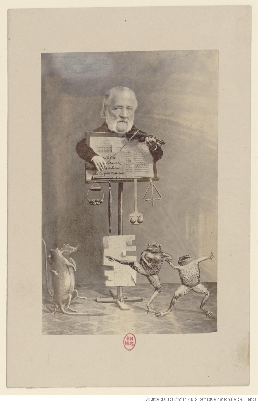 Portrait de Pierre Auguste Marque, (1781-1868) daté au verso de 1865. Document en couleur